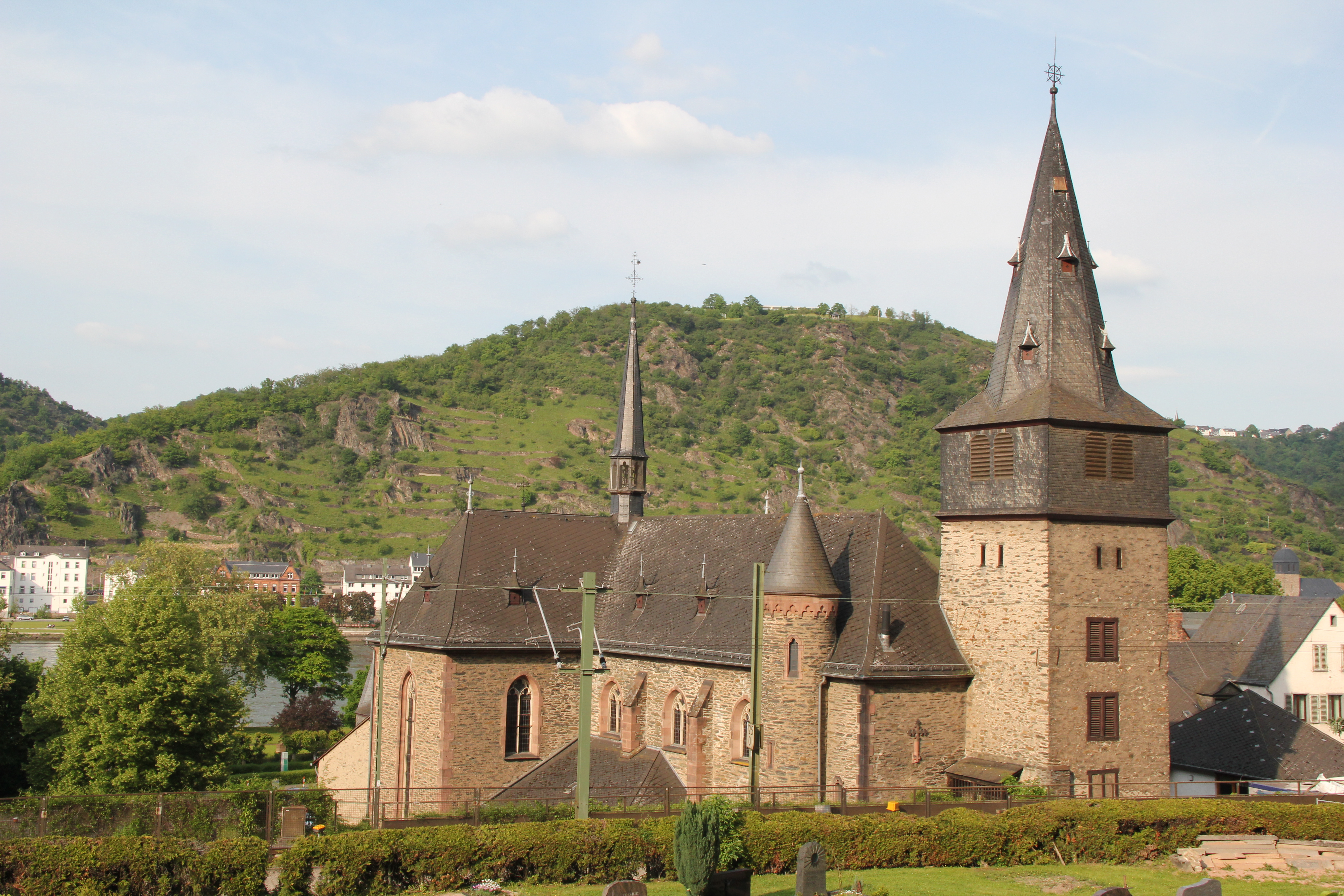 Kath. Kirche St. Goar